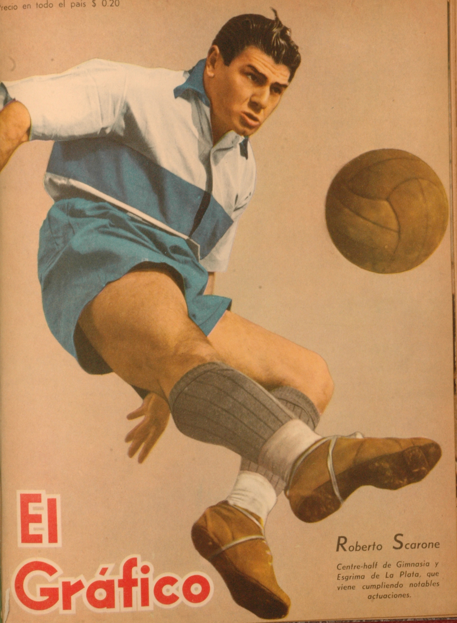 El Grafico del 14 de Agosto de 1942. Edicion 1205